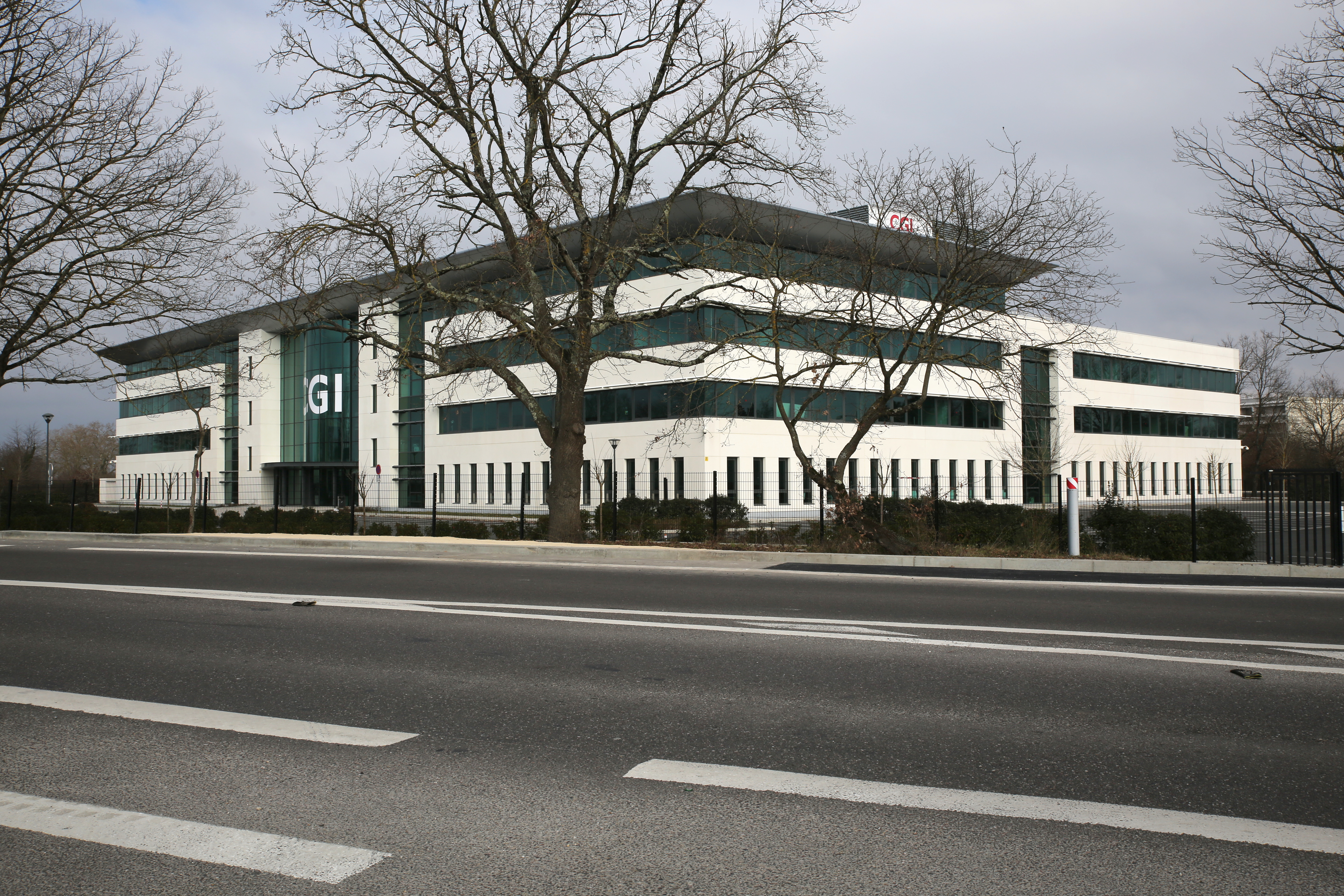 Bâtiment CGI